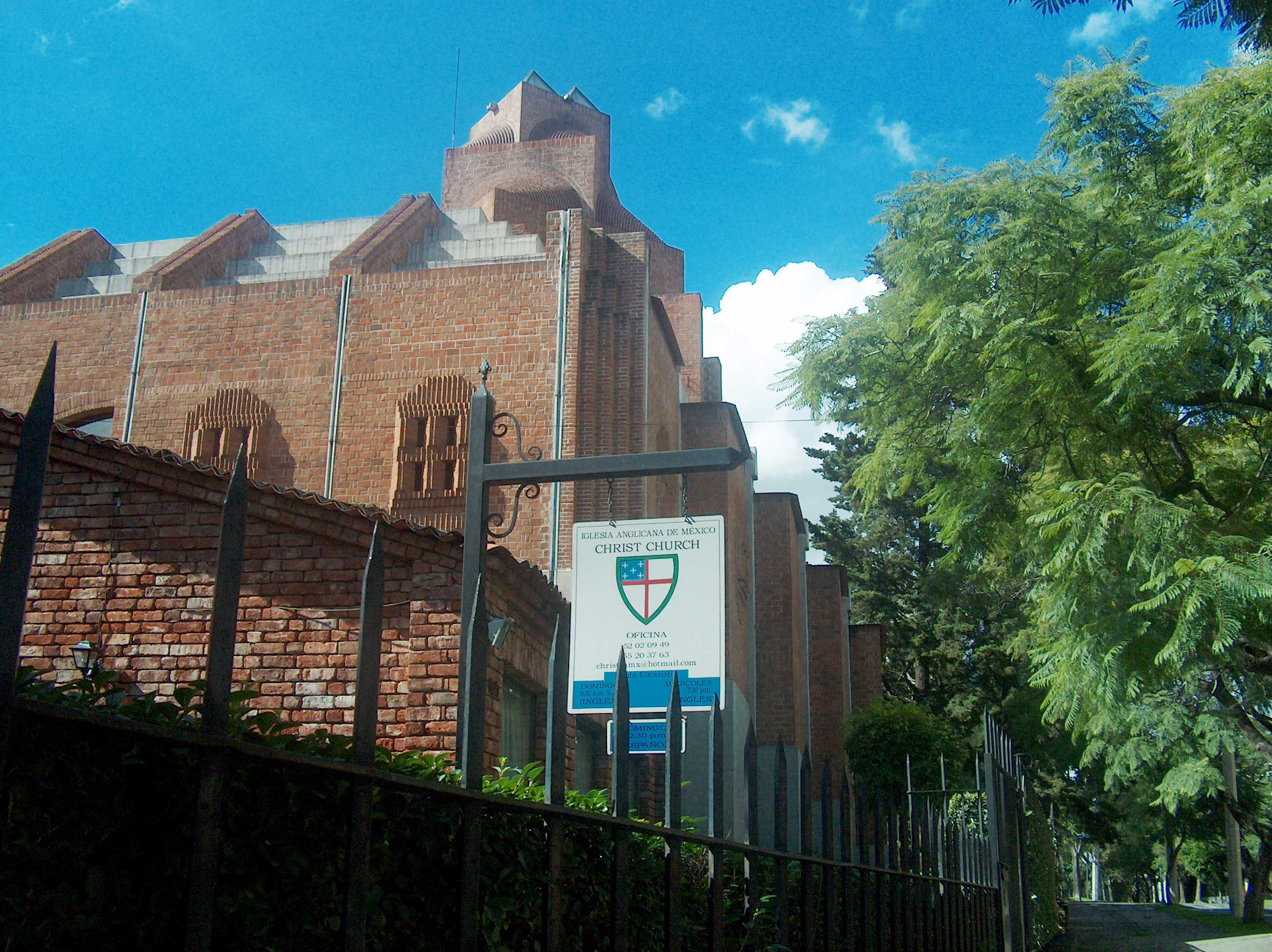 trabajo propio. Modern Christ Church en Lomas de Chapultepec, D.F.